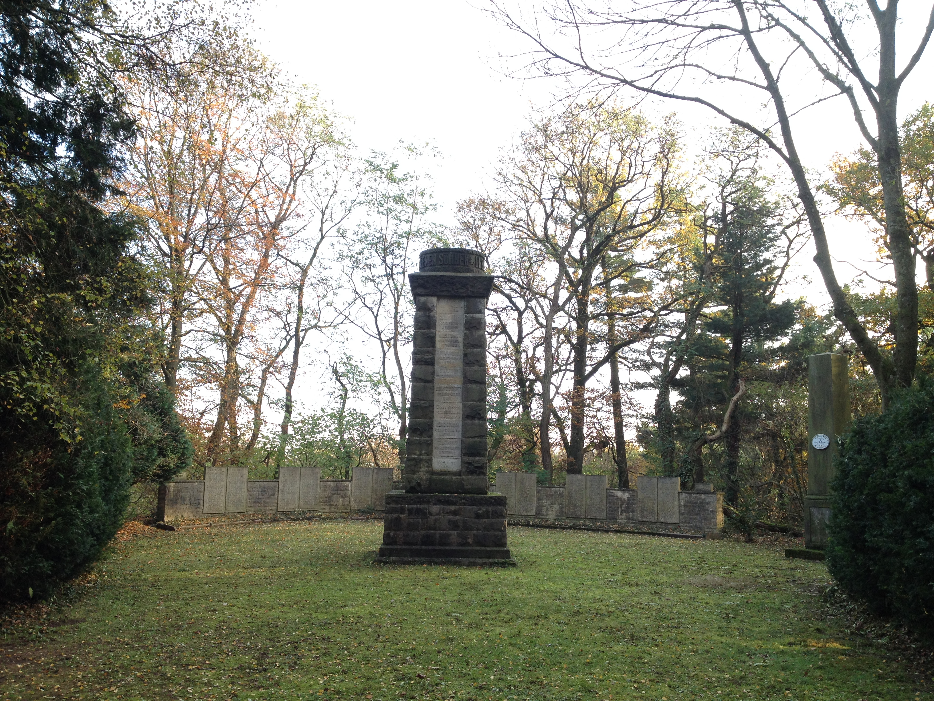 Kriegerdenkmal der Gefallenen des ersten Weltkrieges sowie Gedenksteine jener des zweiten Weltkrieges. Osterwald in 31020 Salzhemmendorf